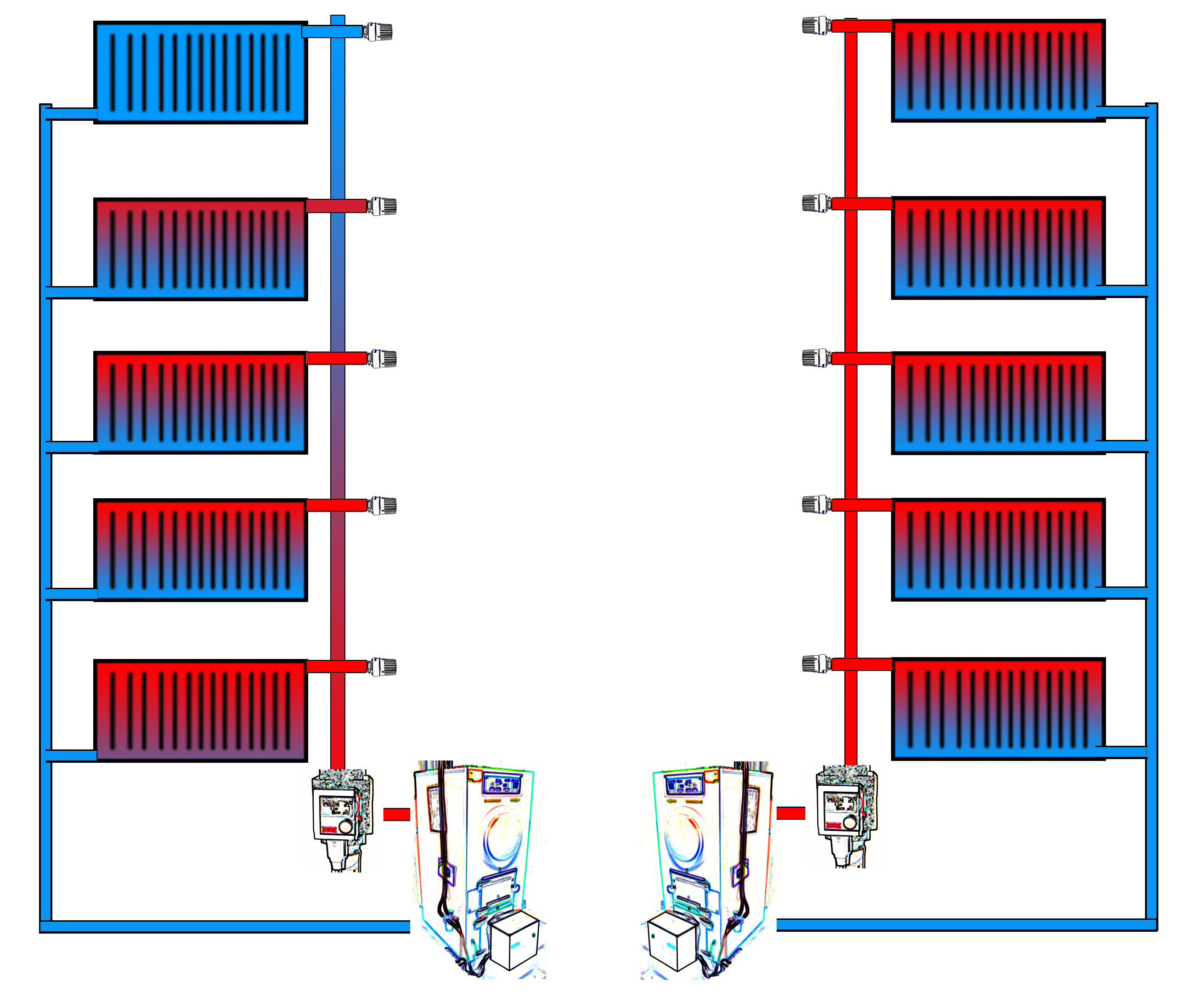 Hydraulischer Abgleich (ohne deutschen Text)